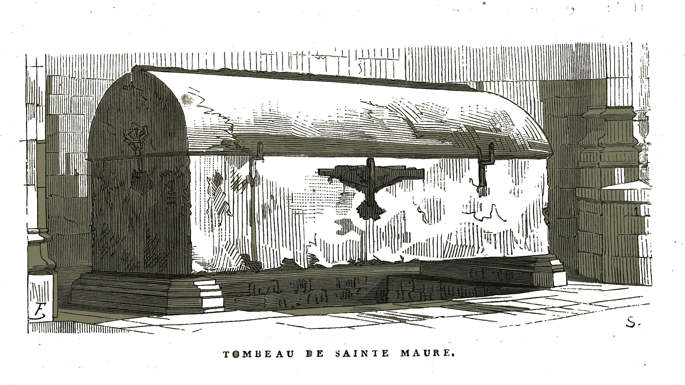 sur un dessin de Fichot.